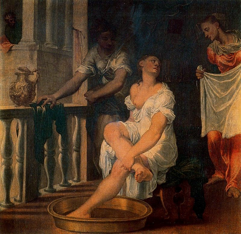 Betsabé en el bañoBathsheba at her bathtitle QS:P1476,es:"Betsabé en el baño" label QS:Les,"Betsabé en el baño"